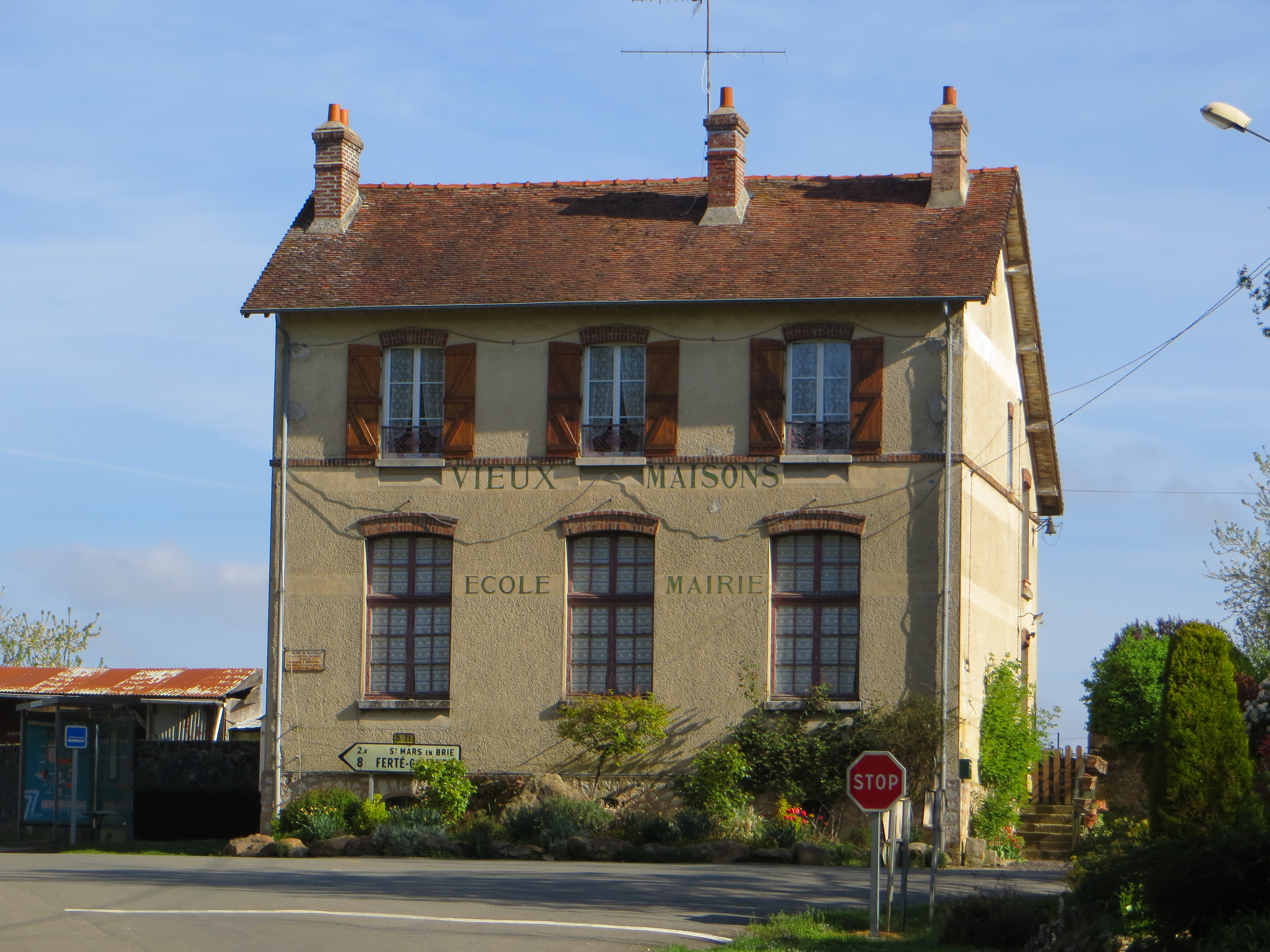 Ancienne mairie dans le hameau de Vieux-Maisons